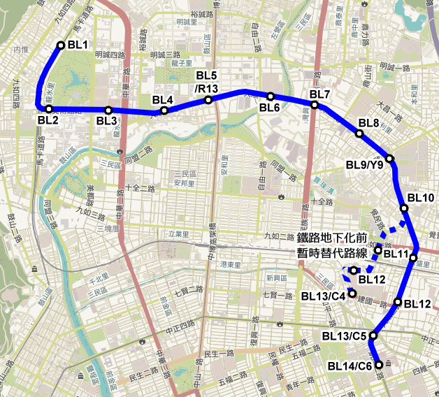 高雄捷運 輕軌藍線 2005年版本